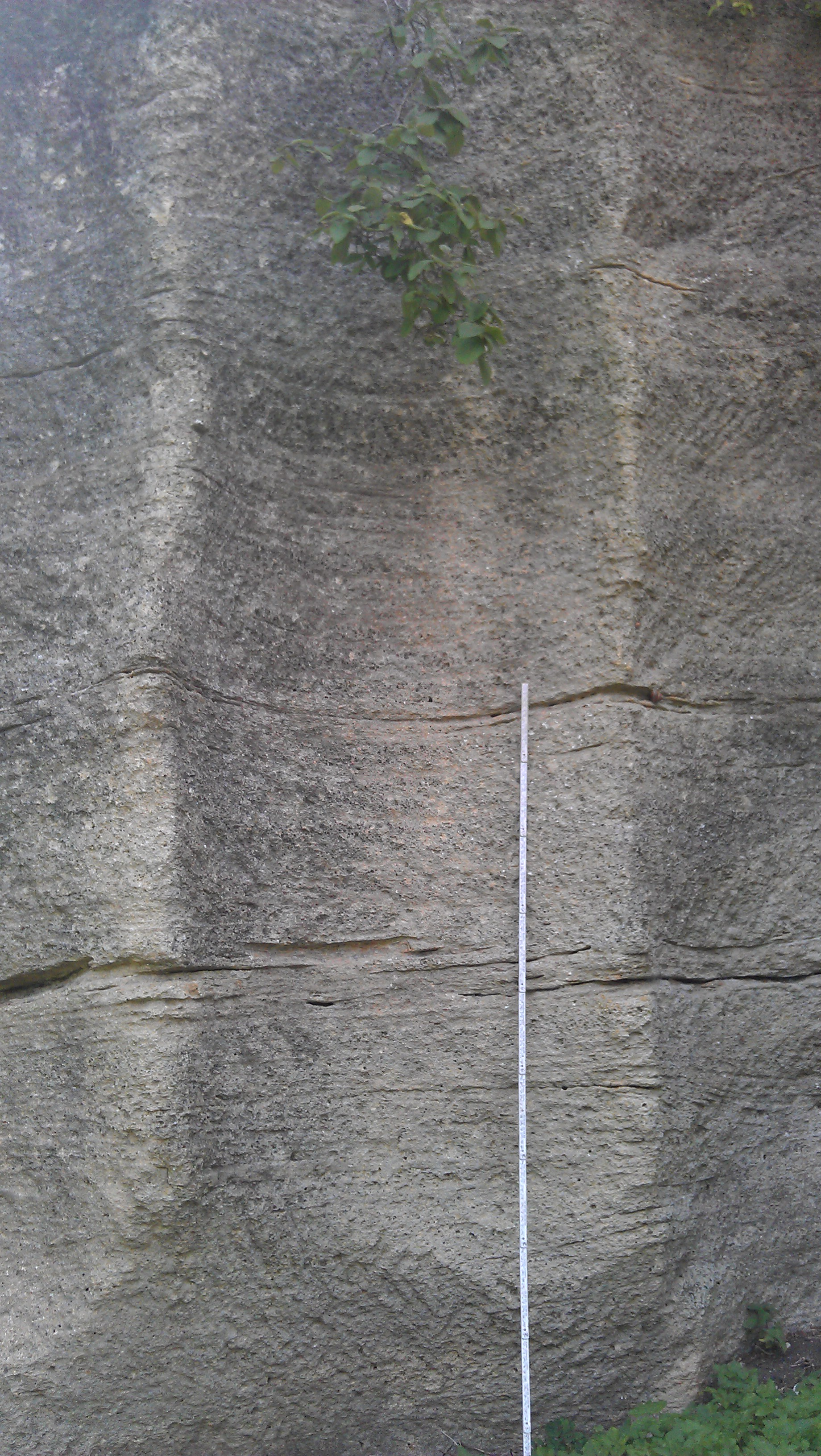 Abbaustelle von Mühlsteinen in Tengen (D).